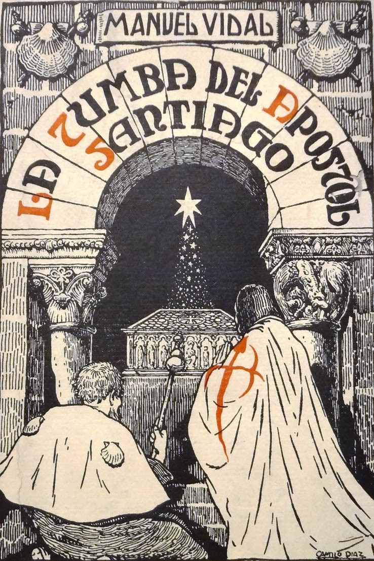 La tumba del Apóstol Santiago de Manuel Vidal Rodríguez